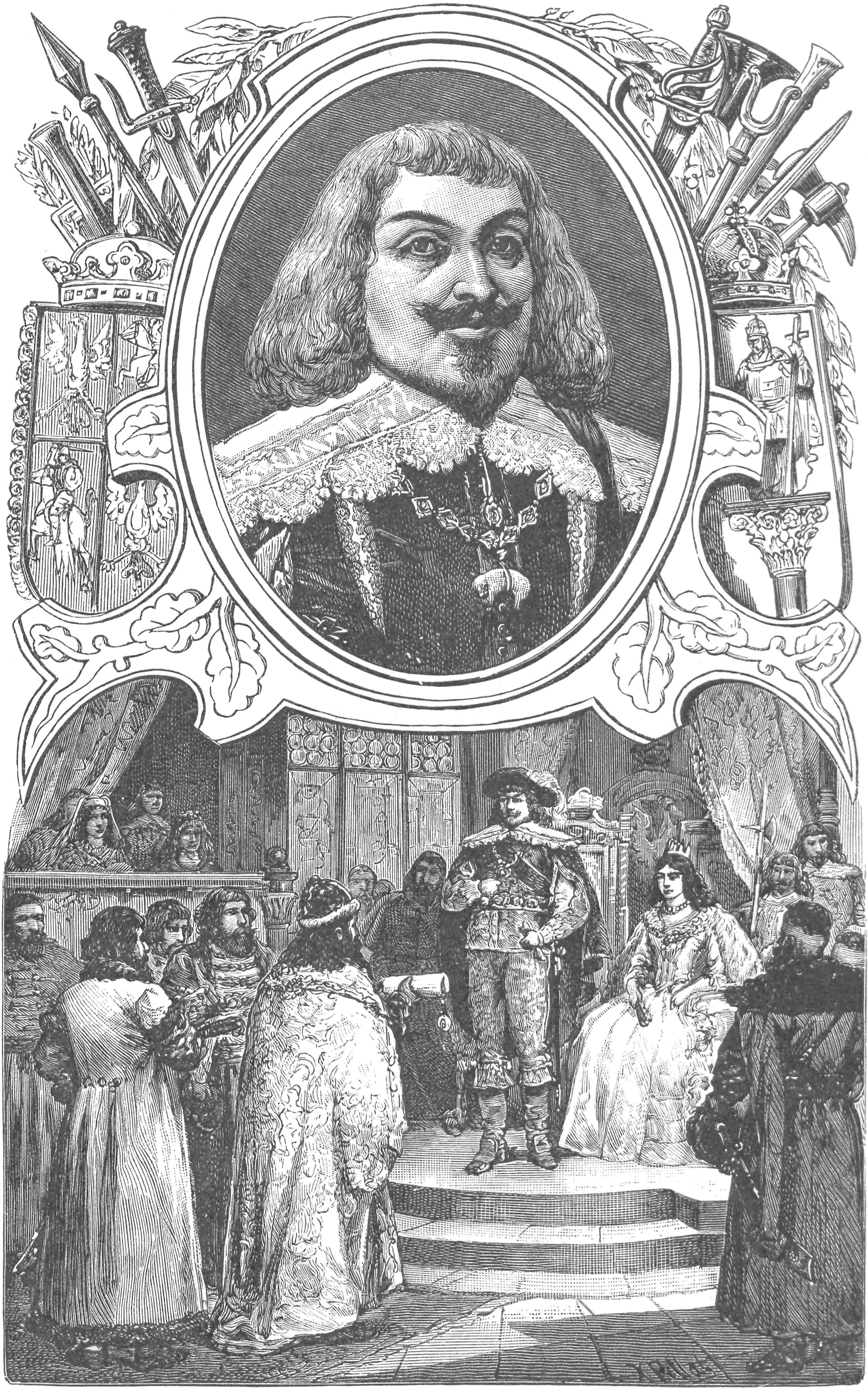 ilustracja z książki „Wizerunki książąt i królów polskich“